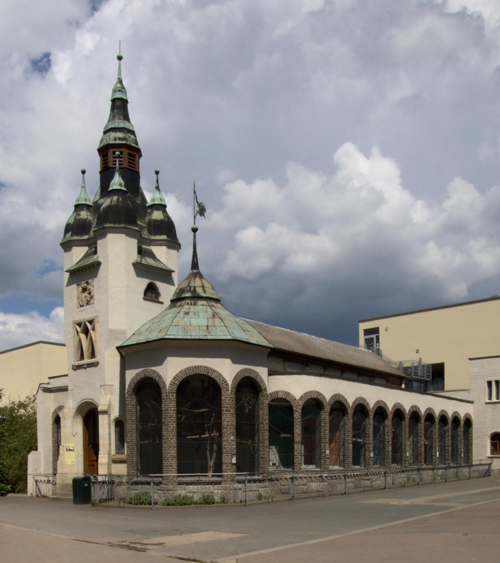 Tieraffenhaus Zoo Leipzig